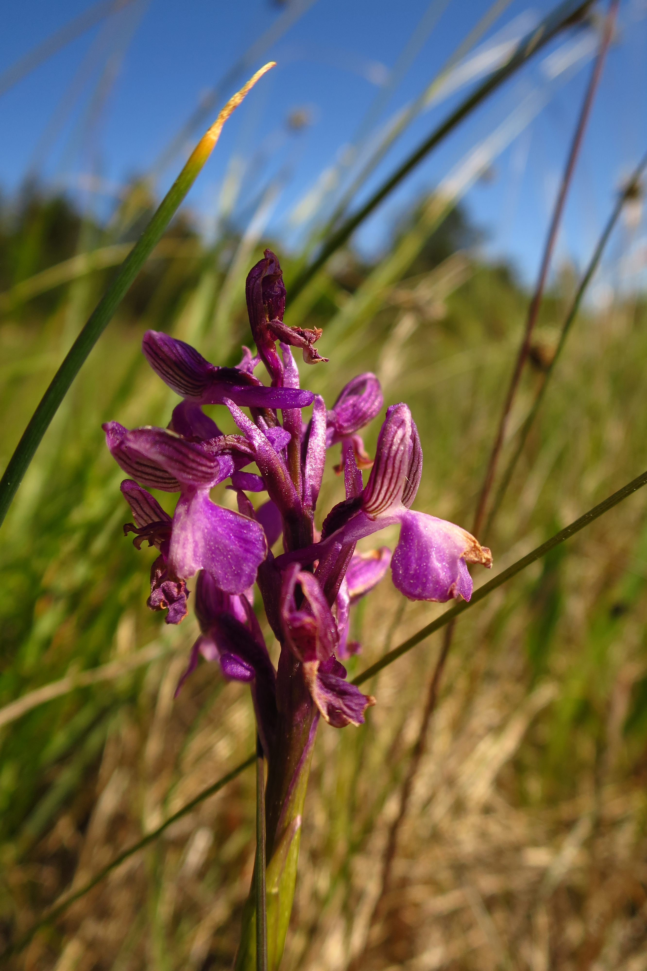 Orchis morio Vilsandil